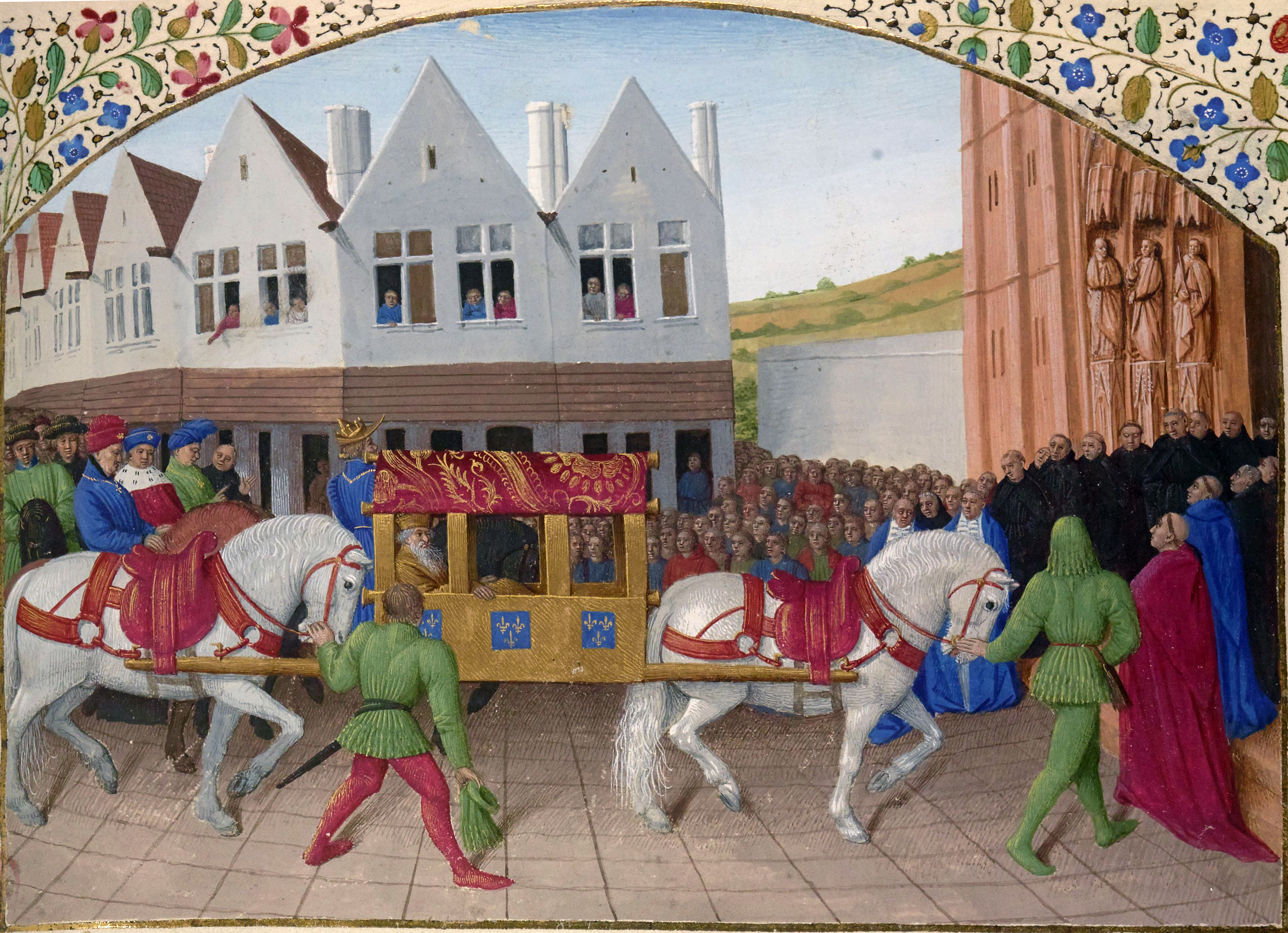 Grandes Chroniques de FranceParis, BnF, département des Manuscrits, Français 6465, fol. 442 (Livre de Charles V)